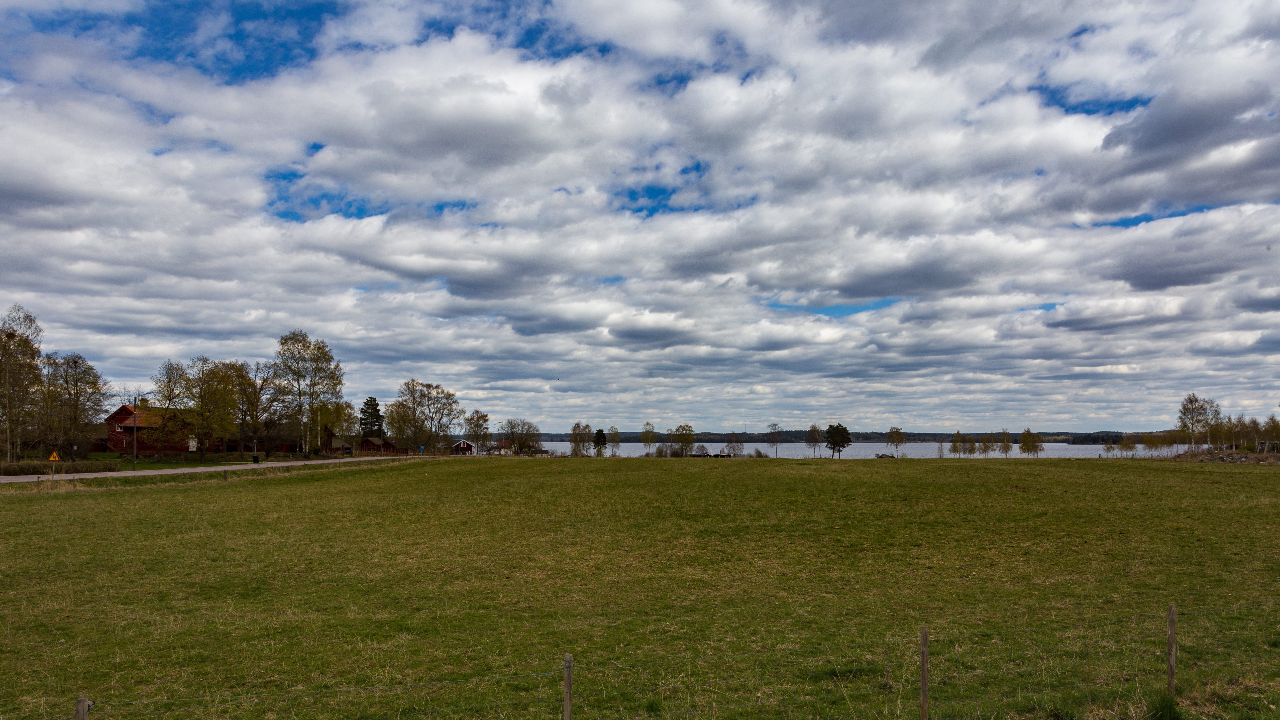 Folkärna gammelgård och sjön Bäsingen sedd från Folkärna, Avesta kommun, Dalarnas län, Sverige.